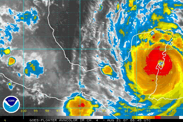 Mapa satelital del huracán Dean el 21 de agostod e 2007.